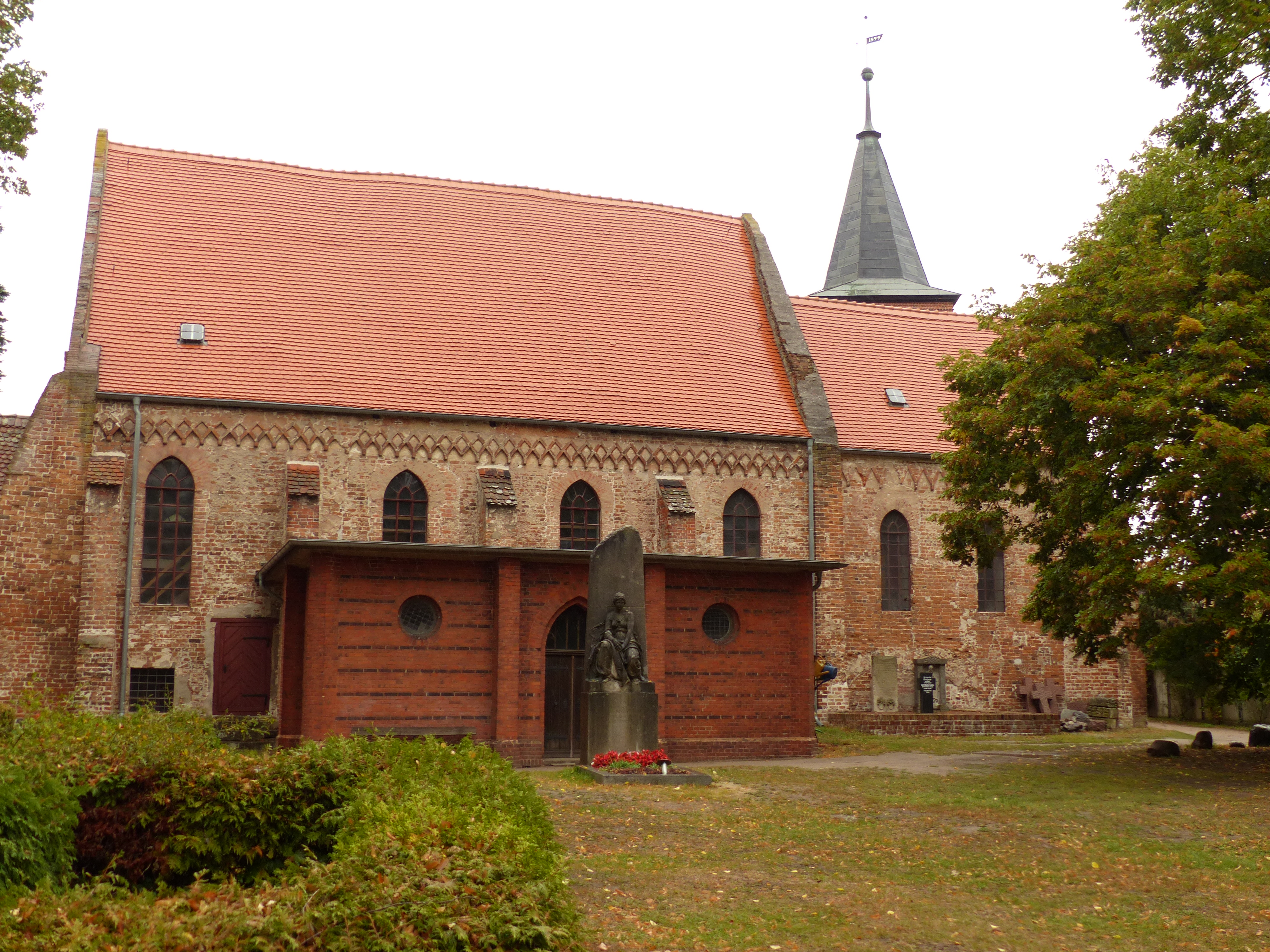 Schiff der evangelischen Kirche in Brandenburg-Plaue, von Süden gesehen